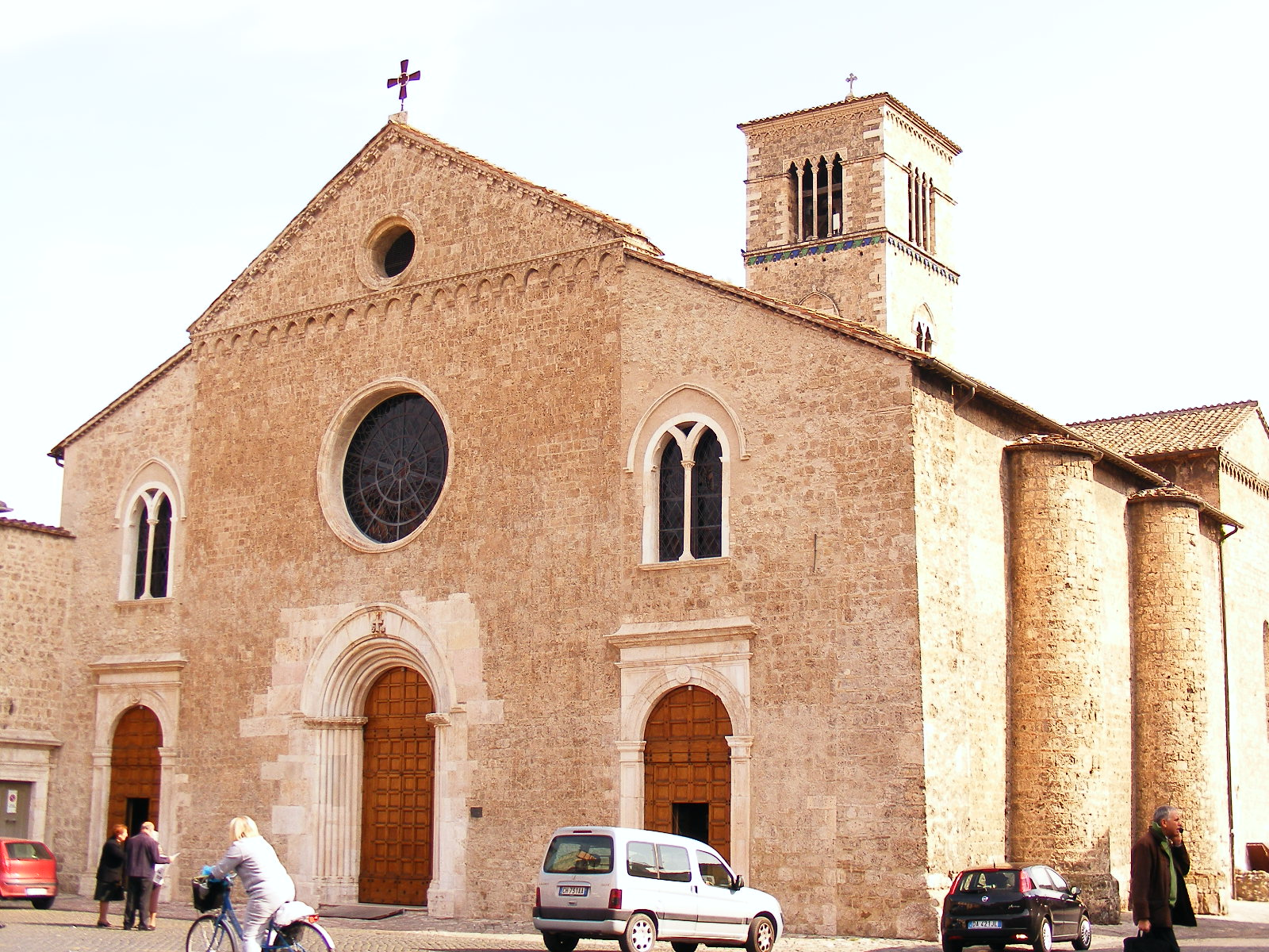 Santuario di San Francesco